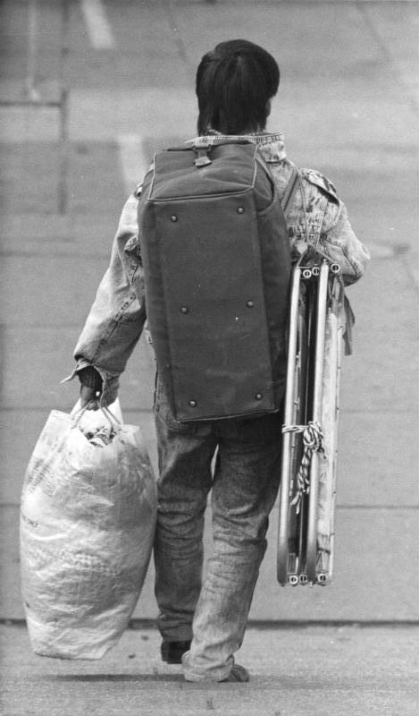 Gera, vietnamesischer Straßenhändler ADN/Jan-Peter Kasper/BER 6/30.10.1990/Gera: Schlechte Zeiten sind jetzt für die im Osten Deutschlands lebenden Ausländer angebrochen. Sie verlieren mit als erste ihren Arbeitsplatz und müssen zum Teil horrende Mieten für einen Wohnheimplatz bezahlen. Viele wollen nicht in die Heimat zurückkehren und suchen eine Alternative. Mit dem Campingtisch unter dem Arm und der Ware auf dem Rücken zieht dieser junge Vietnamese allmorgentlich in die Geraer Innenstadt, um sich als fliegender Händler seinen Lebensunterhalt zu verdienen.